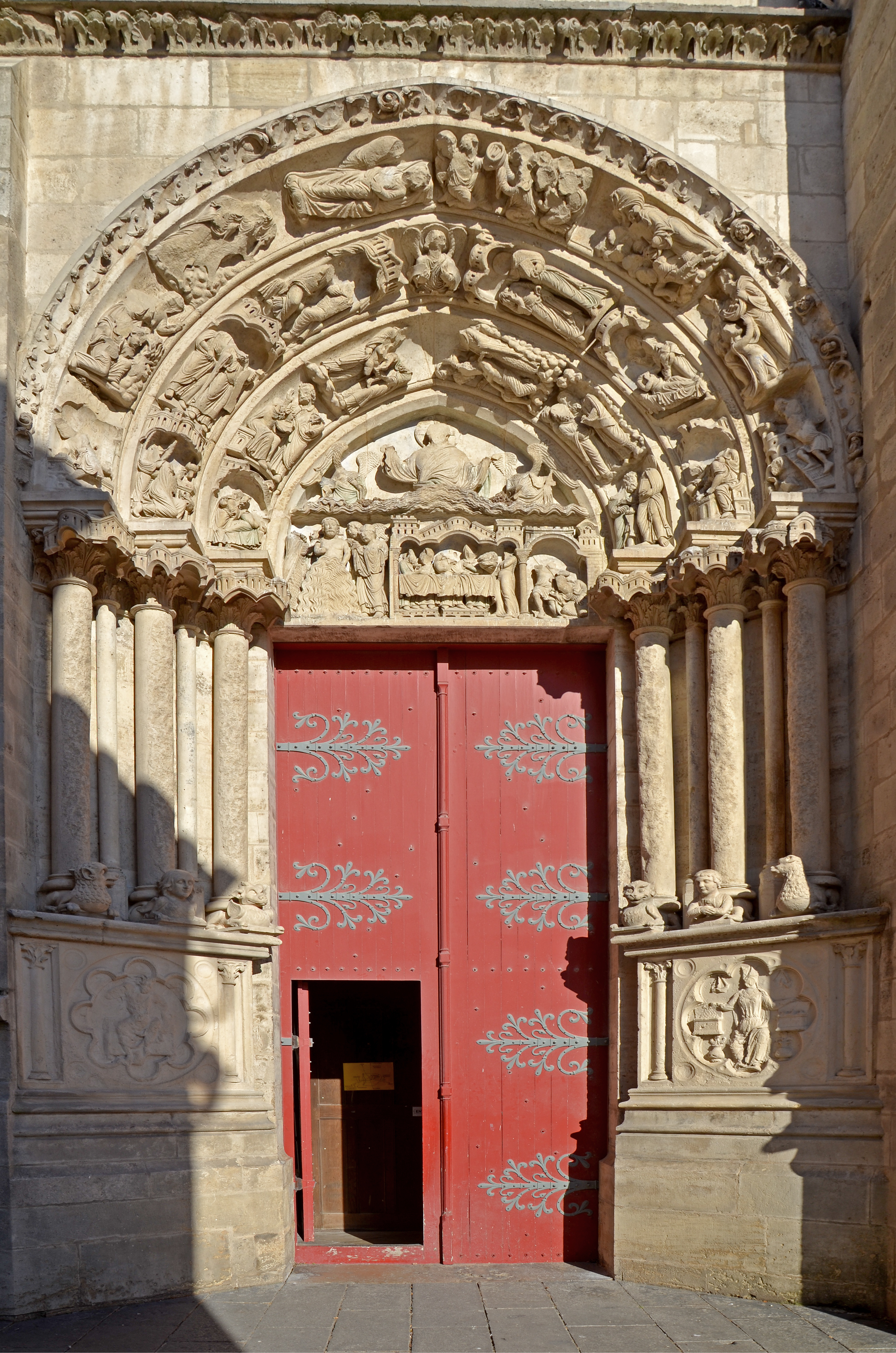 Porche gauche de la facade ouest (principale) de la cathédrale -de Sens, Yonne, Bourgogne,France